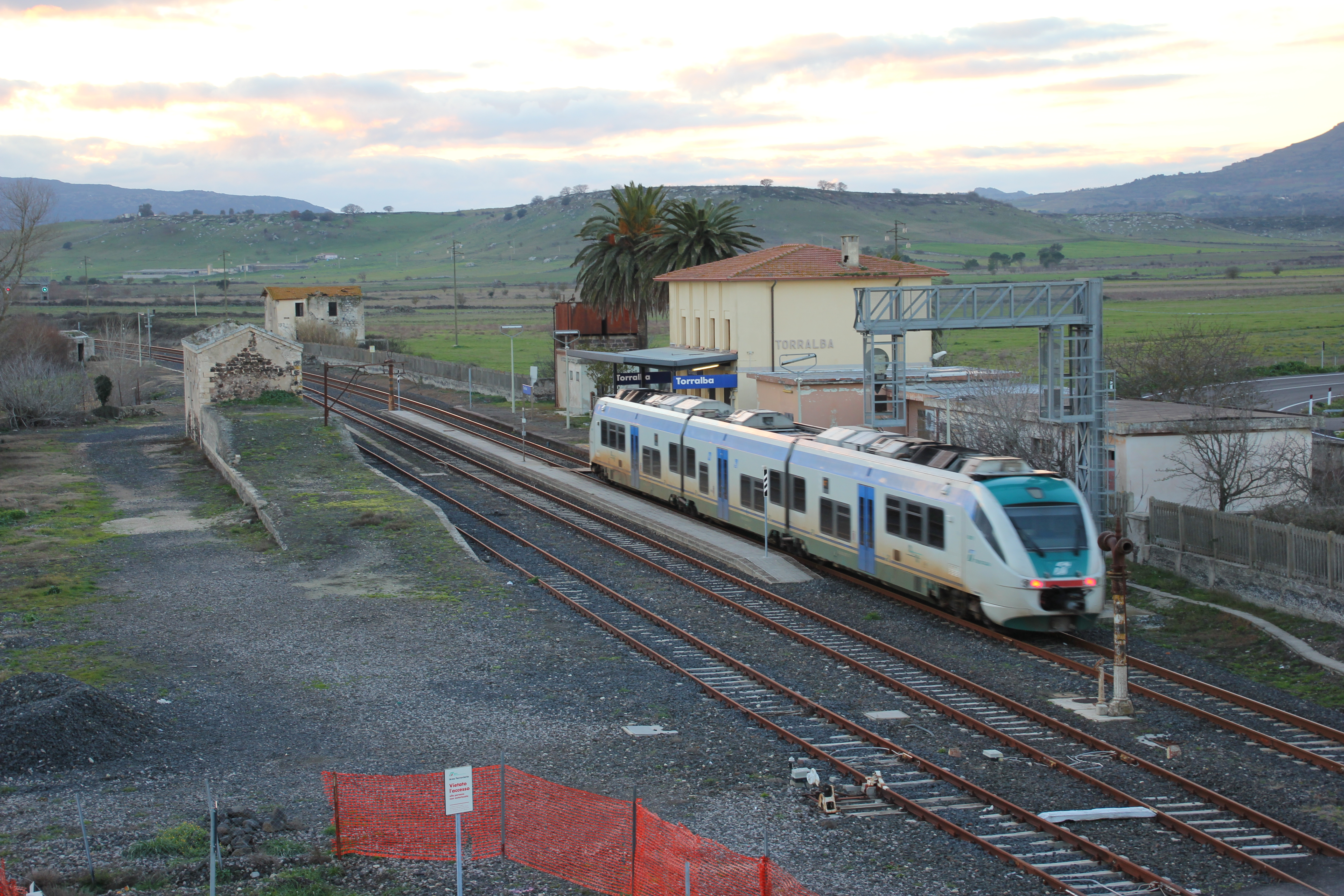 Torralba - Stazione ferroviaria